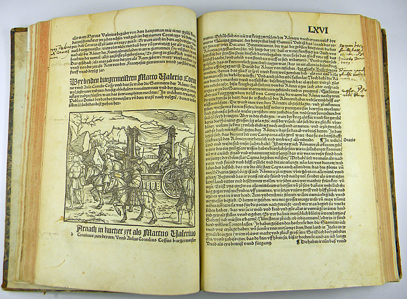 Deutsche Erstausgabe des bekannten Gesamttextes von Titus Livius: "Römische Historien". Reich illustriertes Werk der frühen Geschichtsschreibung, verschönert mit 240 außergewöhnlichen Bild- Holzschnitten und vielen Initialen. Herausgegeben von Johann Schöffer, Mainz, 1523.